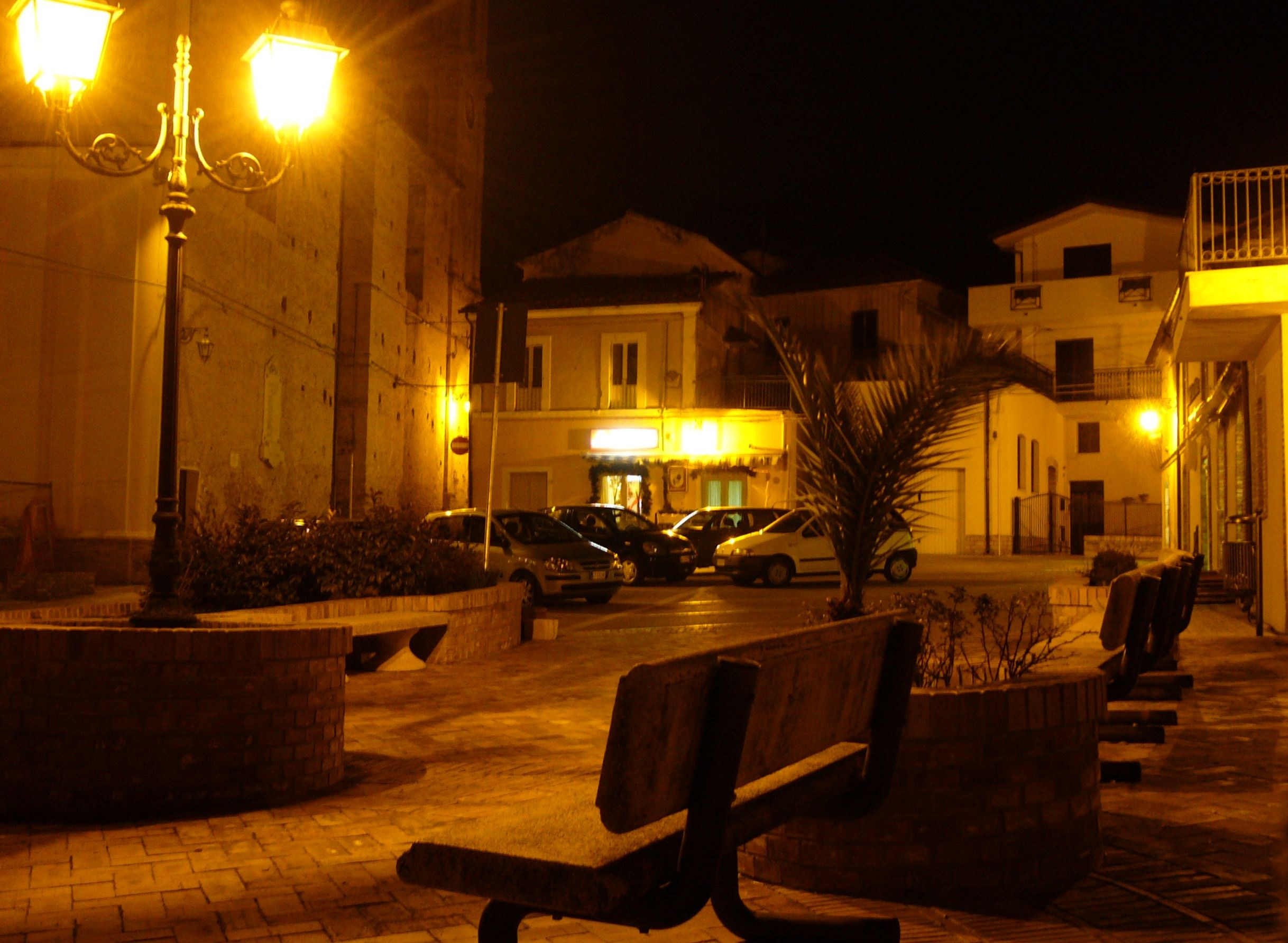 Vacri-Piazza Notturna